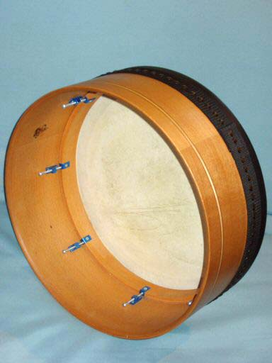 Bodhrán von hinten